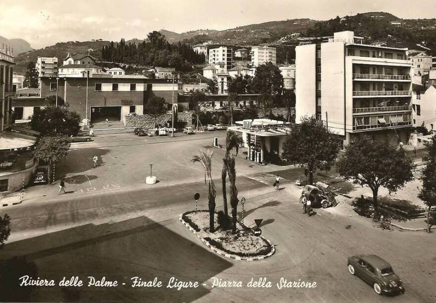 Stazione ferroviaria di Finale Ligure